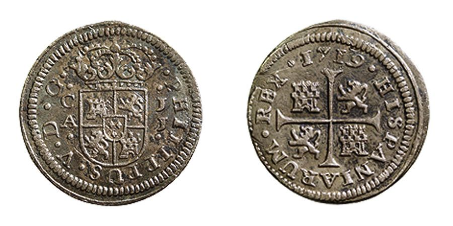 Moneda de mitja ral encunyada en Cuenca el 1719, regnat de Felip V. Feta en plata.